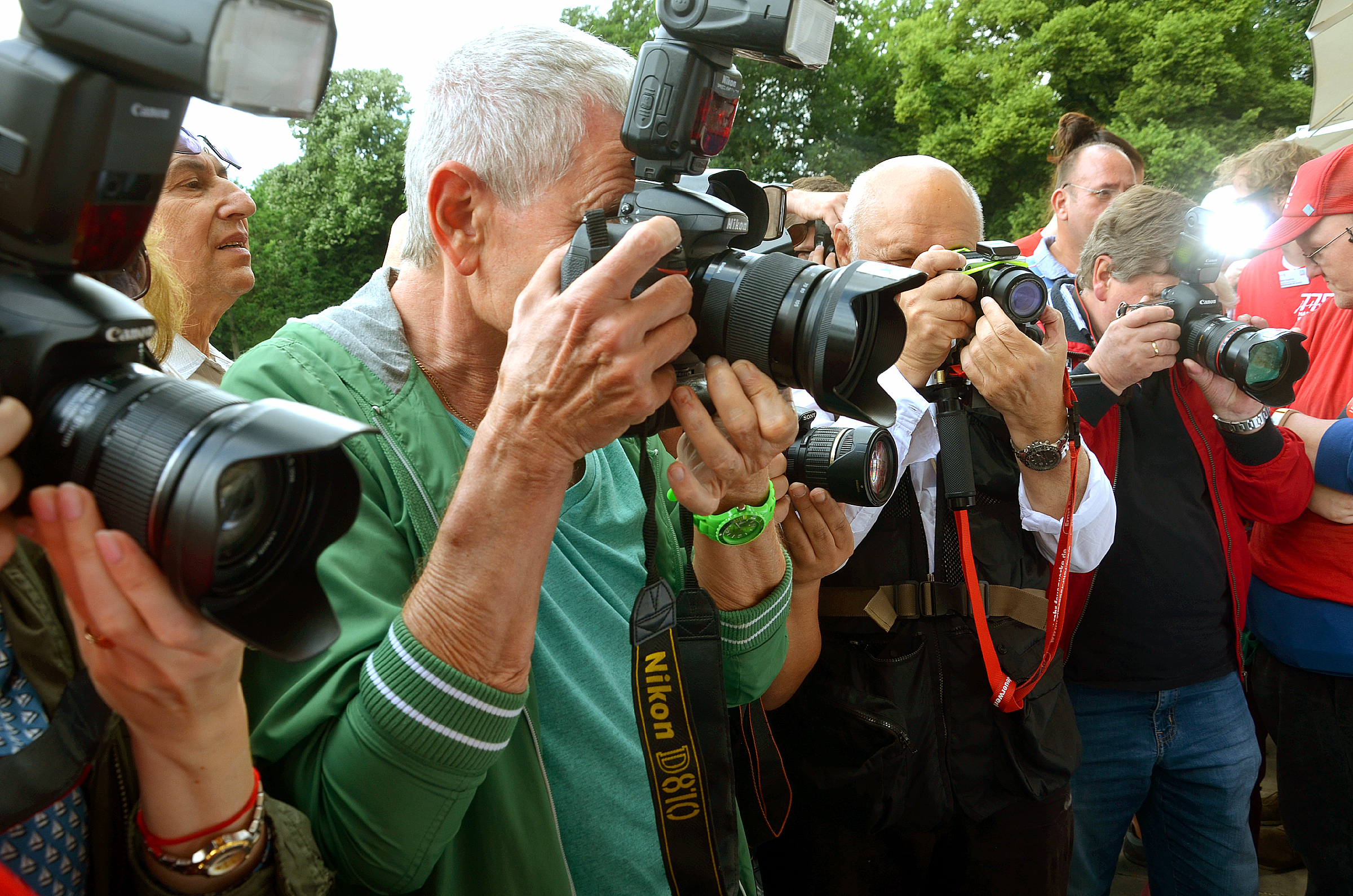 Nur ein kleiner Teil der zumeist ehrenamtlich tätigen Hobby-, Amateur und Dokumentarfotografen bei der Arbeit, während Oberbürgermeister Stefan Schostok gemeinsam mit Matthias Görn vom Freundeskreis Hannover auf den Treppen vom Neuen Rathaus zum Maschpark die von der Bäckerinnung geschenkte riesige Torte unter den rund 20000 Menschen verteilen, die zeitgleich das Familienfest zum 775. Stadtjubiläum Hannovers feiern. Unter den hier sichtbaren Fotografen finden sich auffallend wenige Frauen - nämlich gar keine. Mutmaßlich genau so wenig Männer werden wohl ihre Dokumentationen über dieses Portal namens Wikimedia Commons - dem Schwesterprojekt der Wikipedia - unentgeltlich der Allgemeinheit zur Verfügung stellen. Welch ein Verlust für uns alle. Und welch' verpasste Chancen für die Fotografen, sich mit ihren guten Arbeiten zum Wohle der Allgemeinheit einen bleibenden Namen zu machen ...